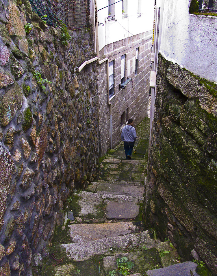 Escaleiras, Vigo